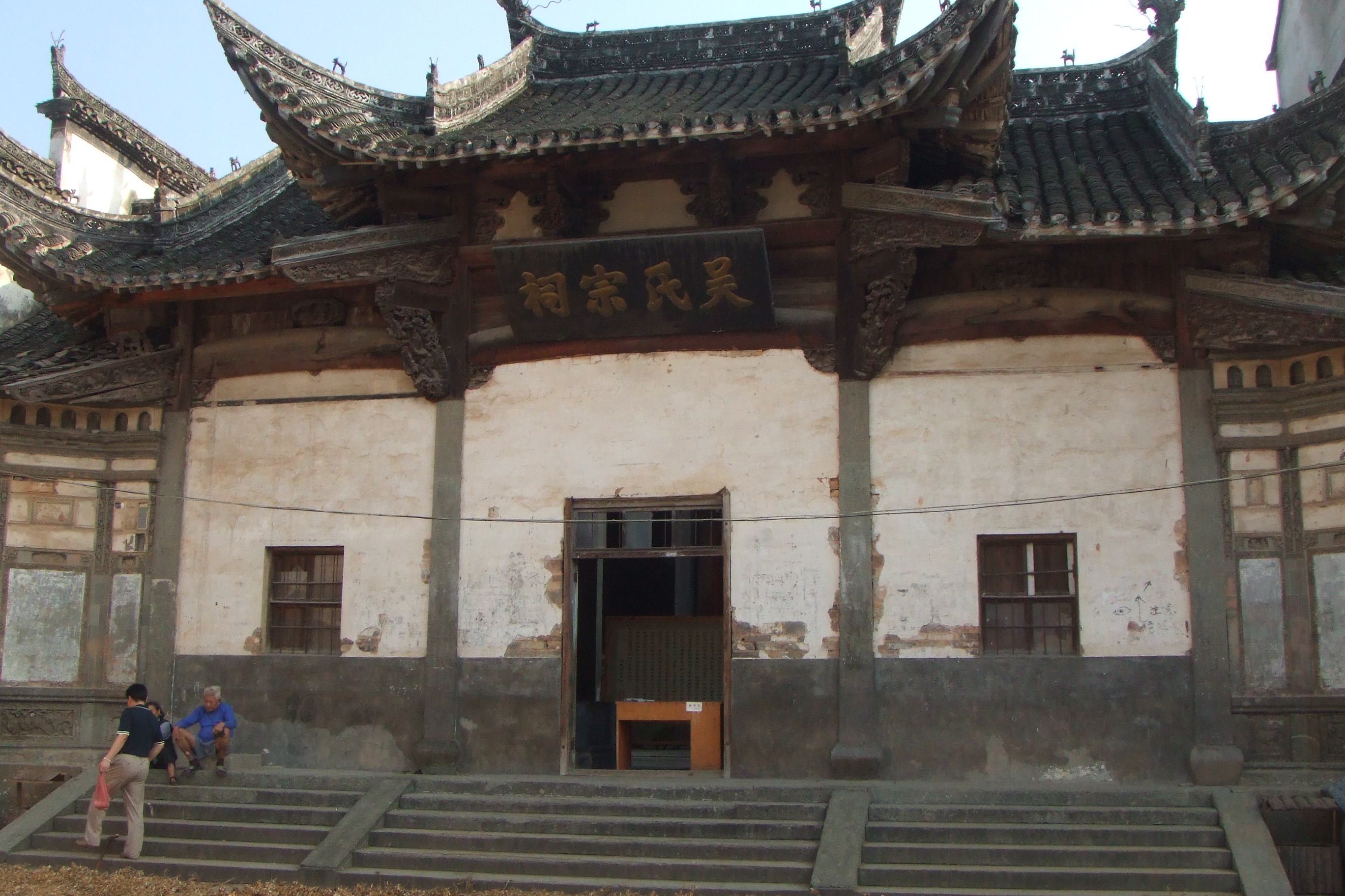 安徽省黃山市歙縣北岸鎮吳氏宗祠